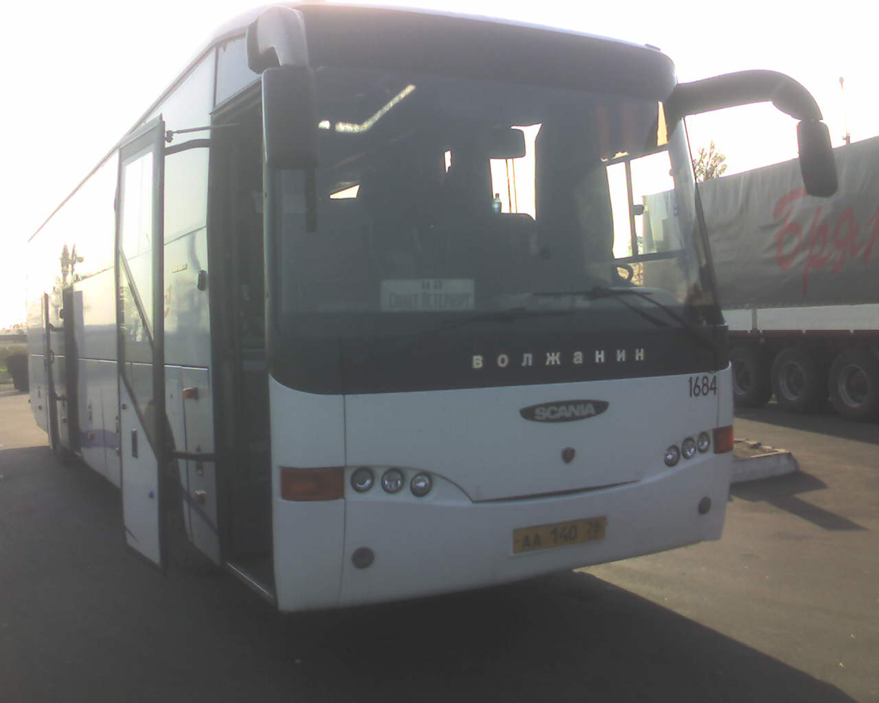 Автобус Волжанин-5285 - Bus Volganin-5285